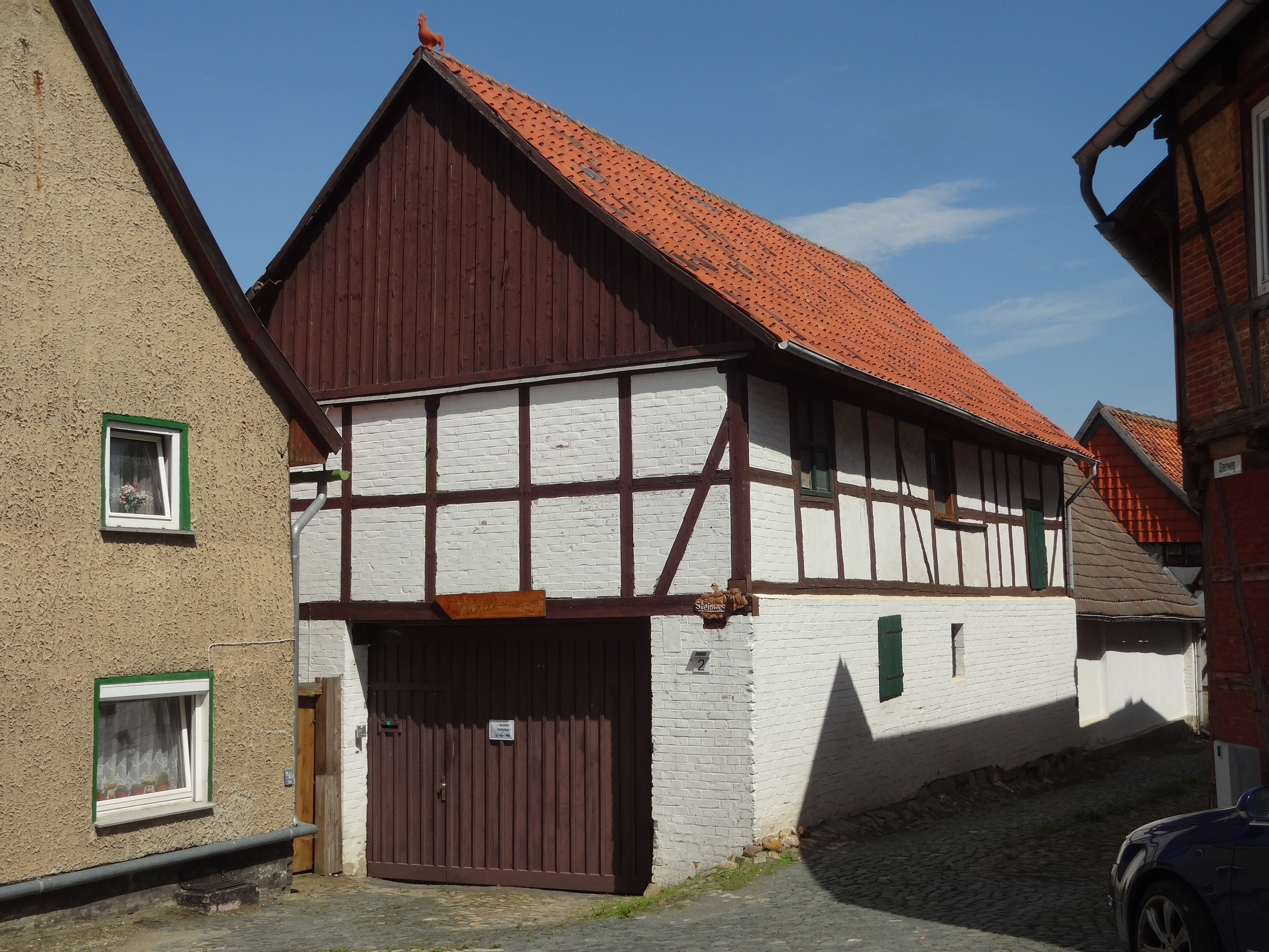 denkmalgeschützte Häusergruppe im Steinweg 1 und 2 in Börnecke, Ortsteil von Blankenburg/Harz